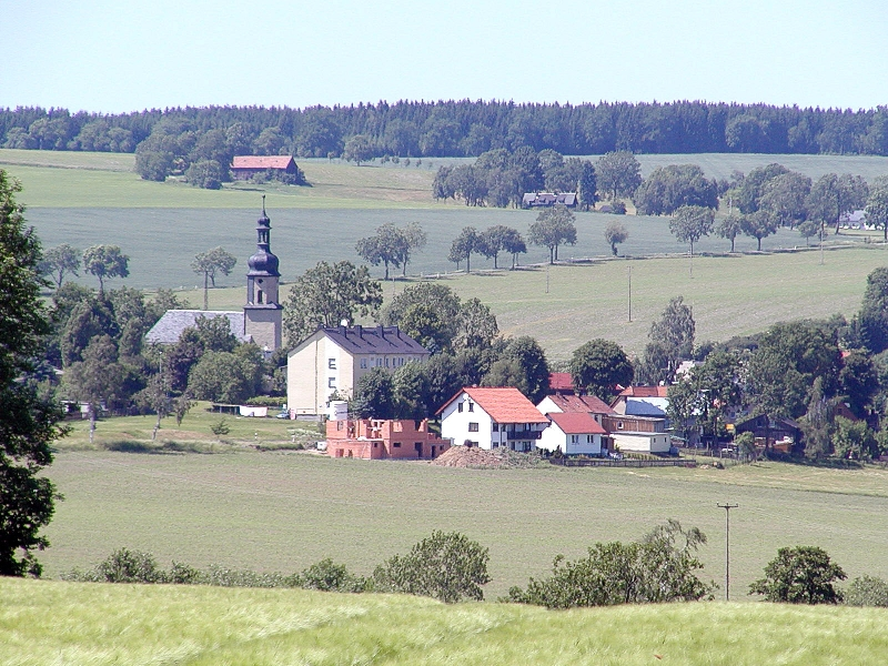 Kemnitz, ein kleines Dorf im Vogtland